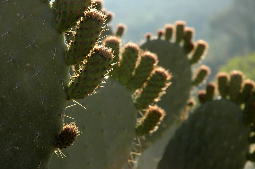 Haut-Atlas marocain. Figuiers de Barbarie. Thierry Milherou